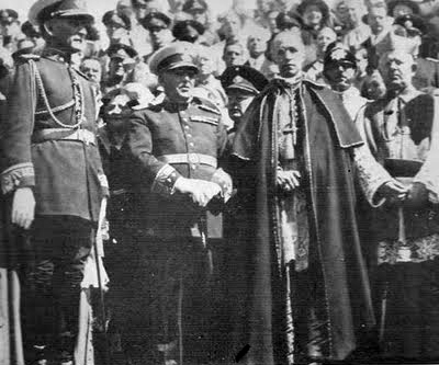 Eugenio Pacelli en Argentina (1934)